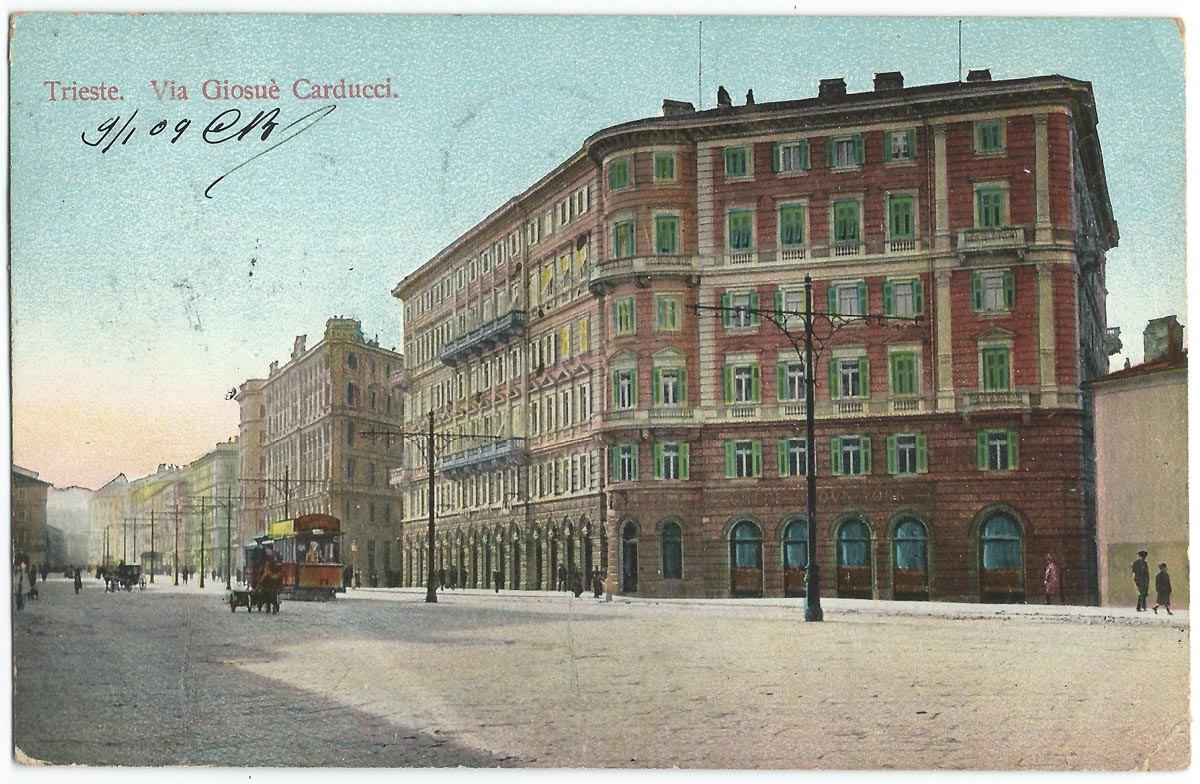 Vue de Trieste au début du XXe siècle.